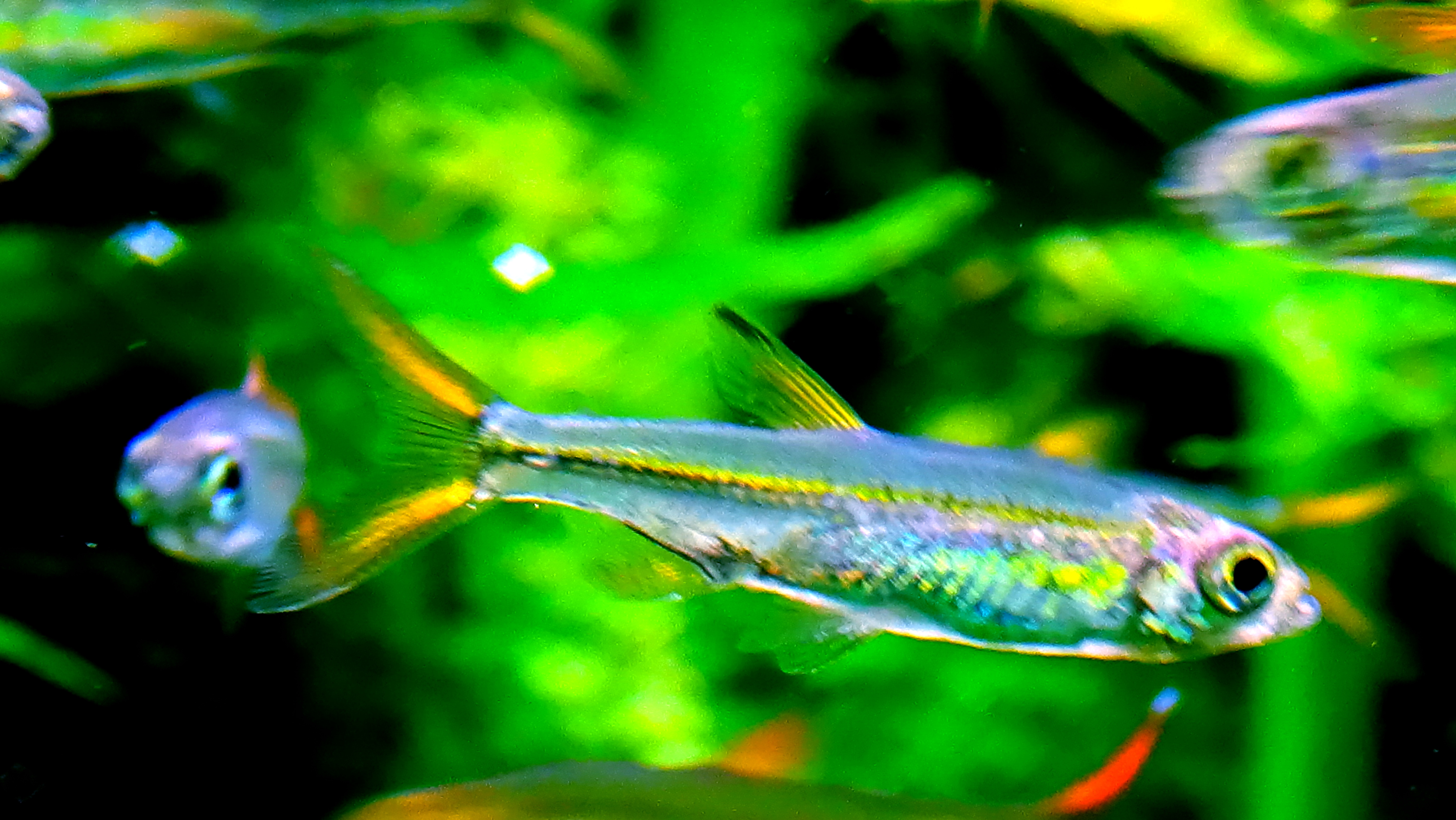 Ladigesia roloffi - Aquarium tropical du Palais de la Porte Dorée - 06/2015